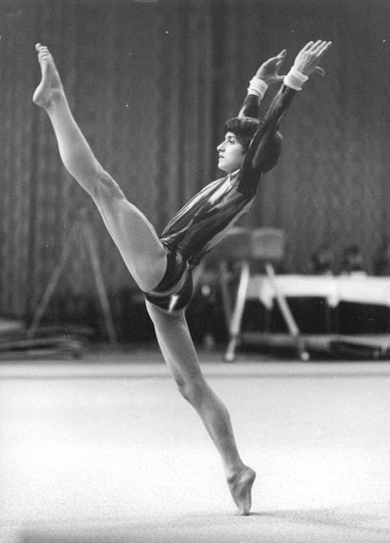 Regina Grabolle ADN-ZB Mittelstädt 1-10-79 Schwedt: 31. DDR-Meisterschaften im Turnen - Die 14jährige Regina Grabolle (SC Dynamo Berlin) setzte sich mit 38,55 Punkten nach der Pflicht an die Spitze. In ihrer Bodenübung erreichte sie 9,45 Punkte.